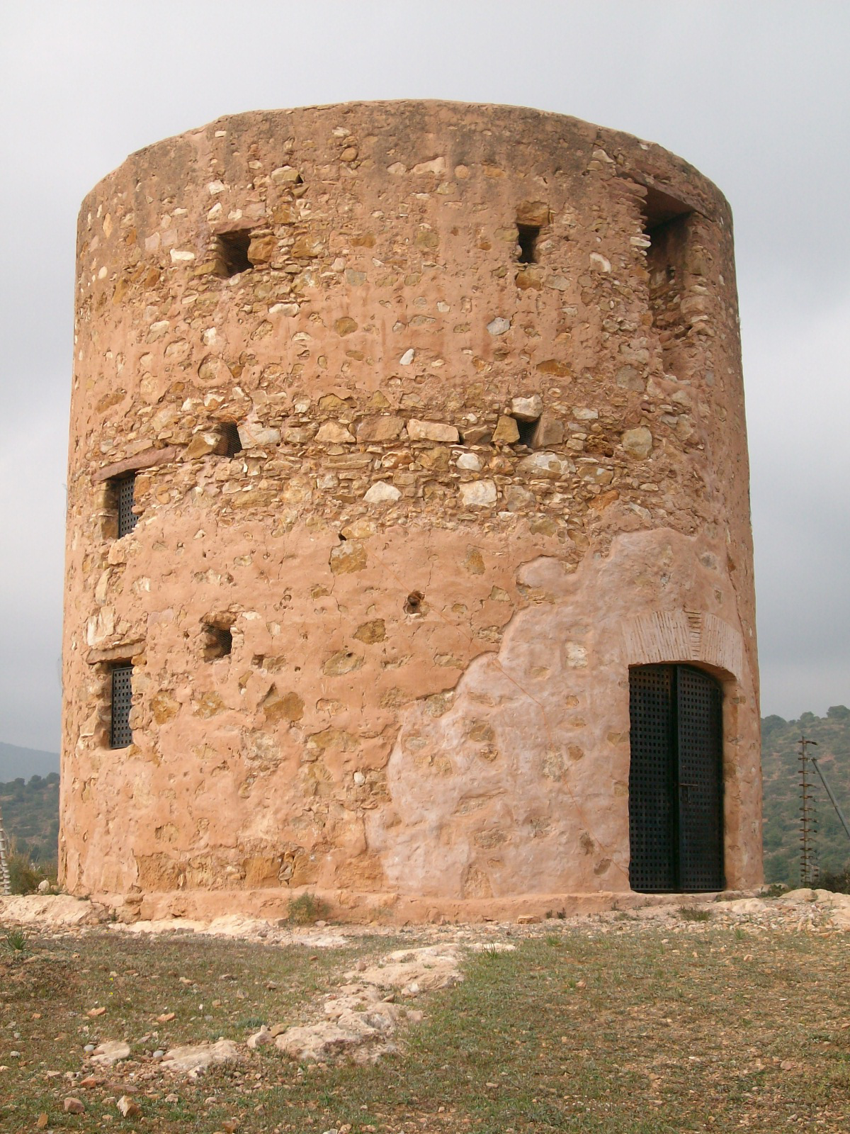 Torre medieval de Puçol 13.205-005.